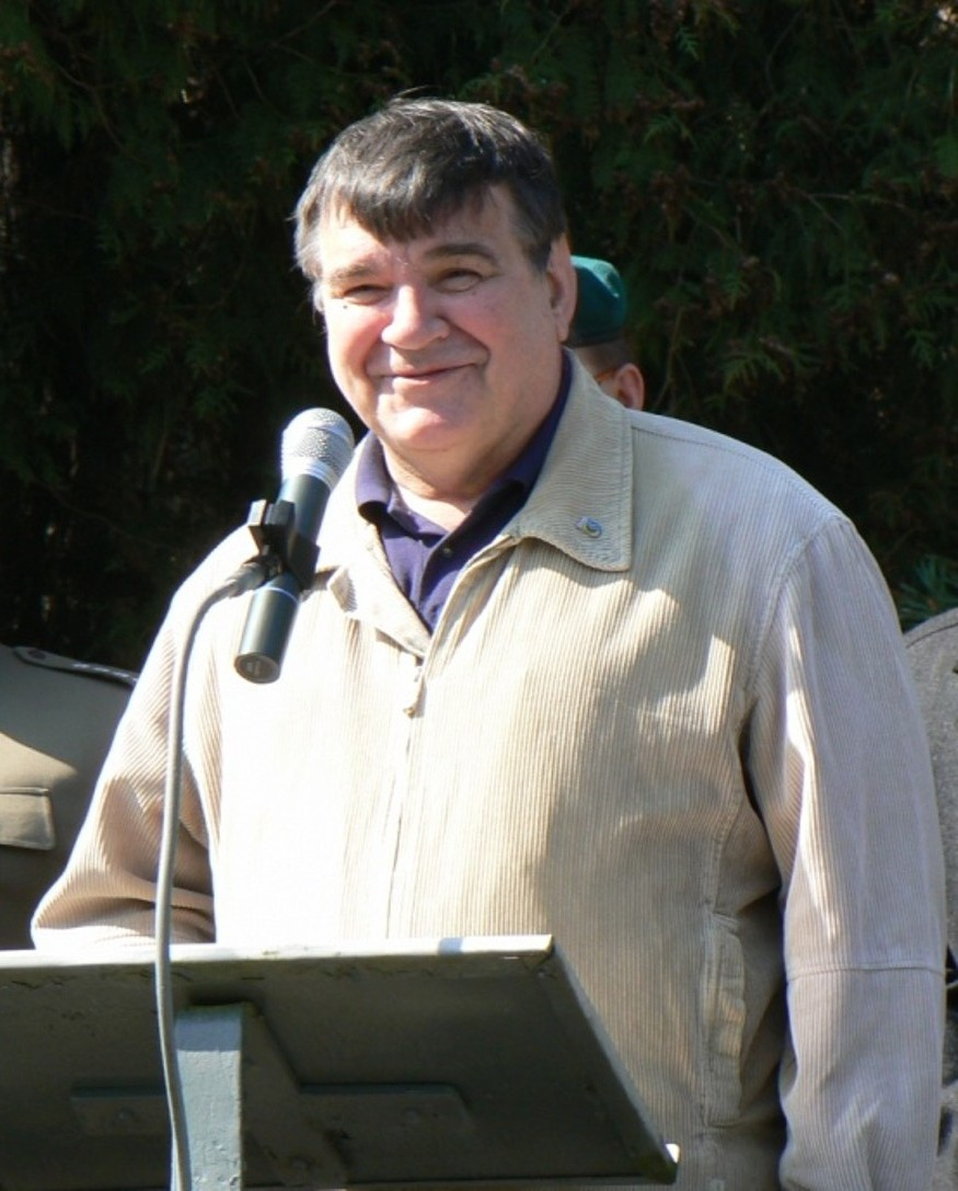 Ppłk rez. Andrzej Szutowicz